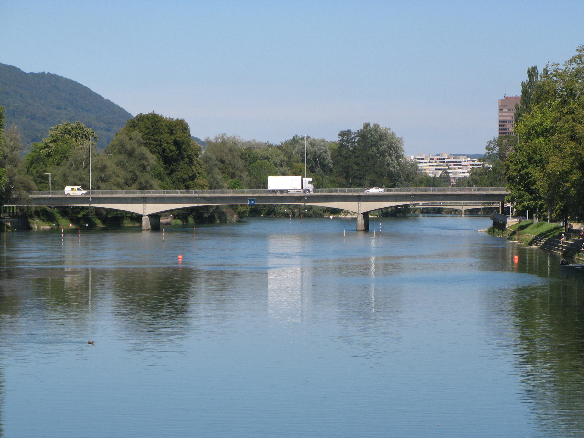 Kettenbrücke über die Aare in Aarau